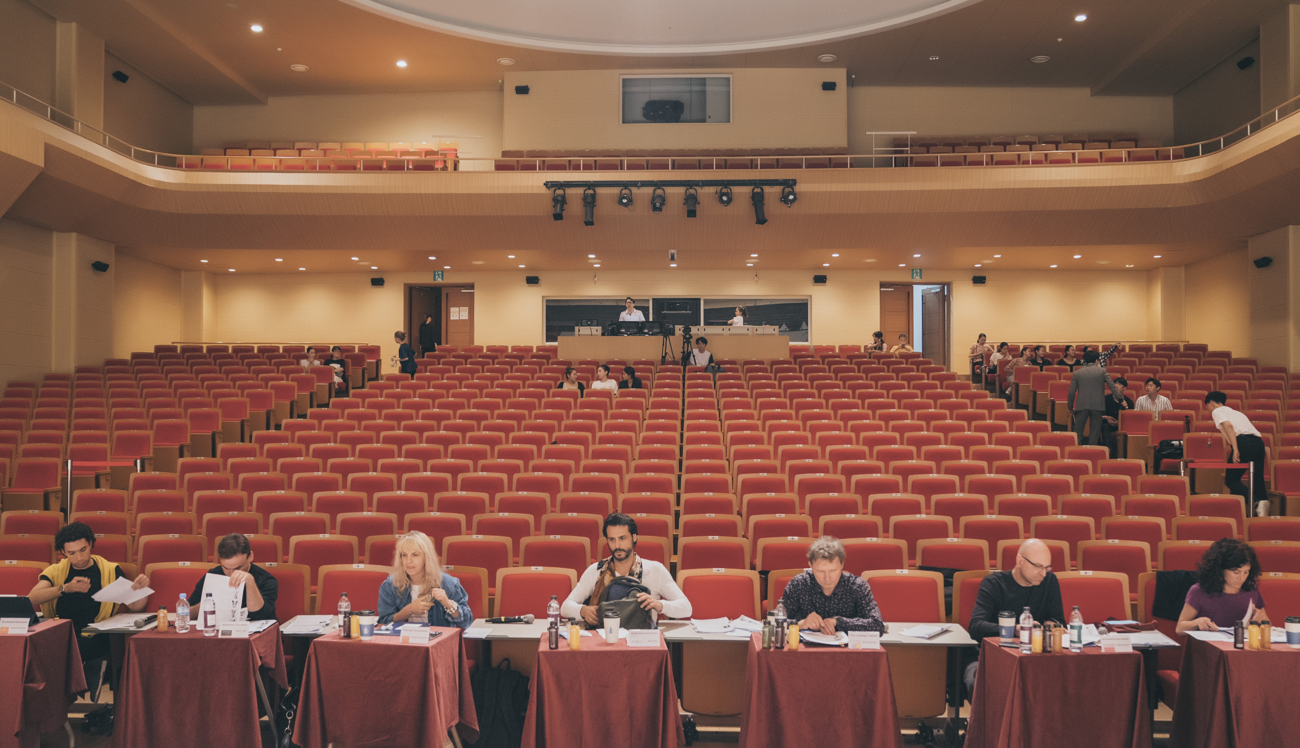 Alysson Da Rocha (Ballett dortmund), Robert Mills (Oklahoma City Ballet), Silvana Schröder (Thüringer Staatsballett), Igor Yebra (Uruguay National Ballet), Mario Schröder (Leipziger Ballet), Sergei Vanaev (Bremerhaven Ballett), Maša Kolar (Croatian National Ballet in Rijeka)